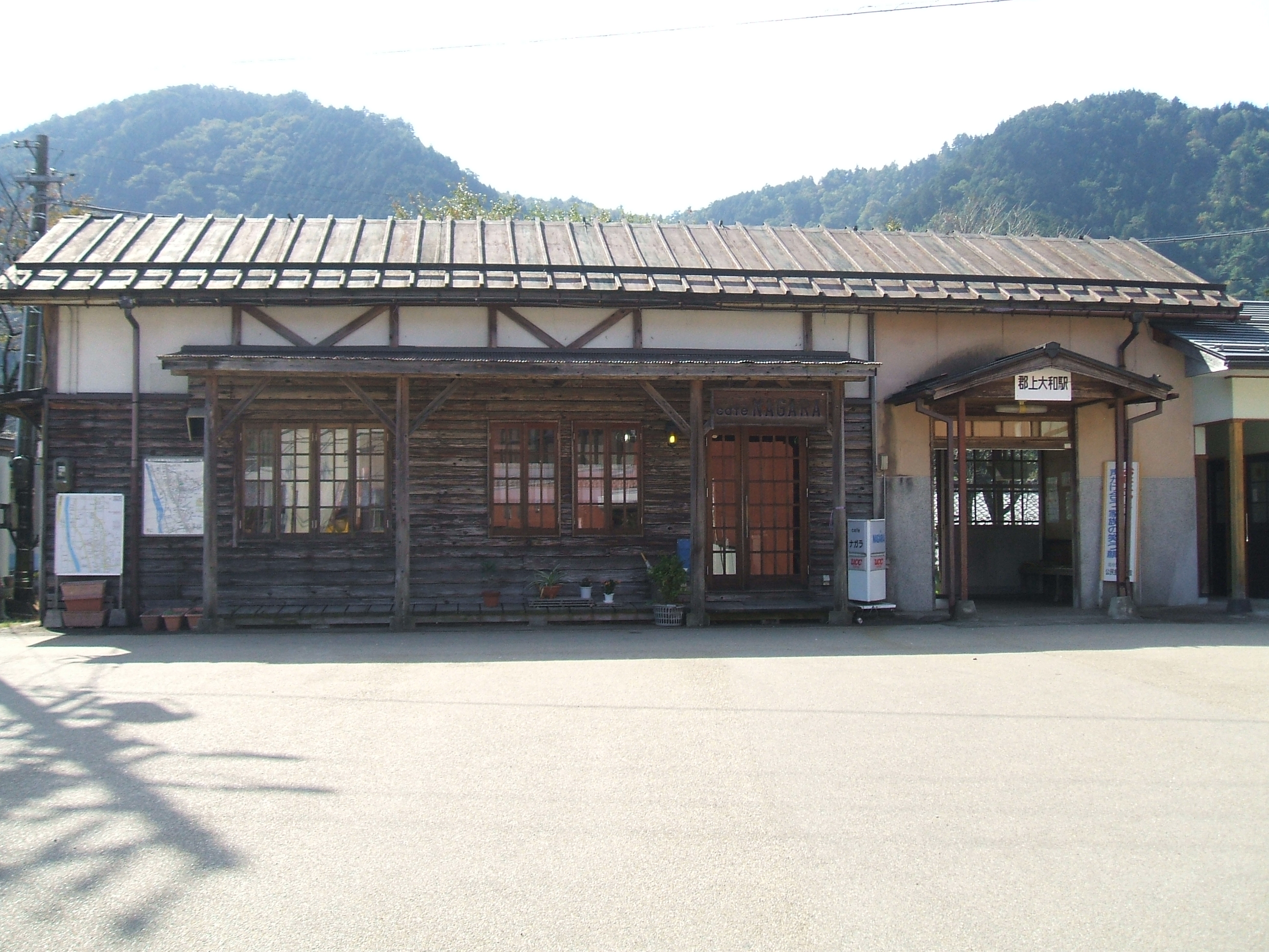 駅舎の様子。